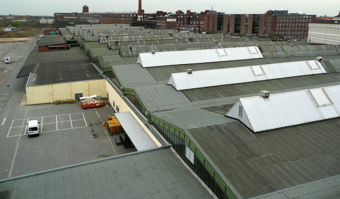 Blick auf die Dachflächen des Hauptgüterbahnhofs Hannover